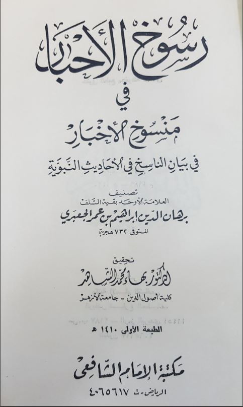 رسوخ الأحبار في منسوخ الأخبار في بيان الناسخ في الأحاديث النبوية تصنيف العلامة برهان الدين إبراهيم بن عمر الجعبري